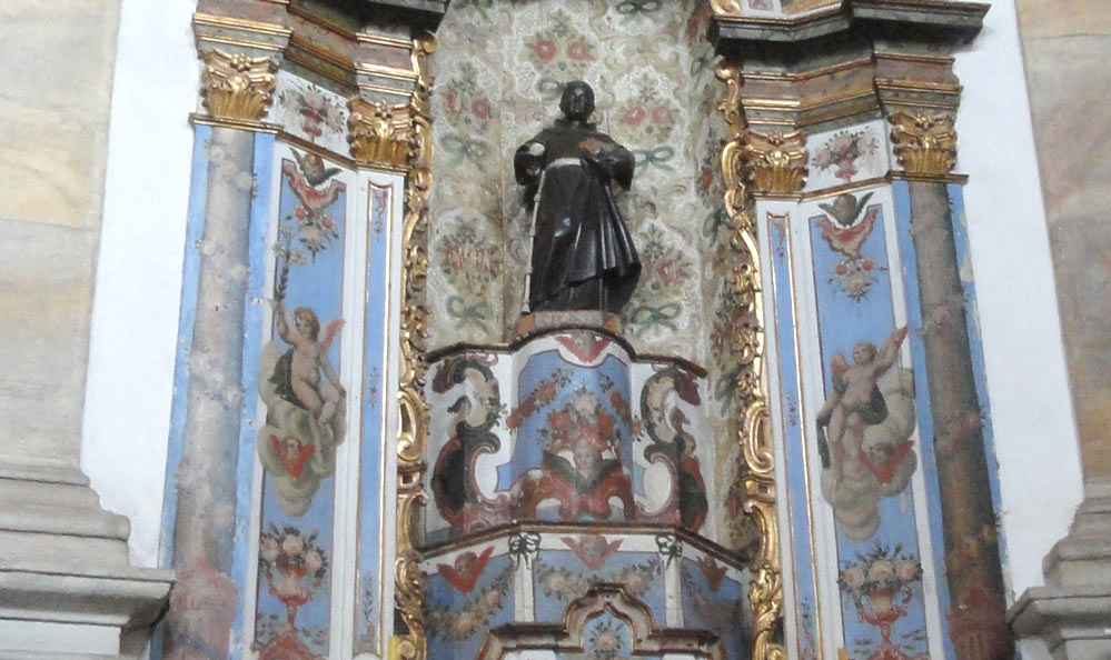 Igreja de Nossa Senhora do Rosário dos Homens Pretos